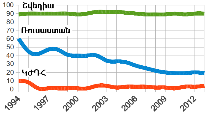 Մամուլի ազատությունը Ռուսաստանում՝ Շվեդիայի և Հս. Կորեայի համեմատ